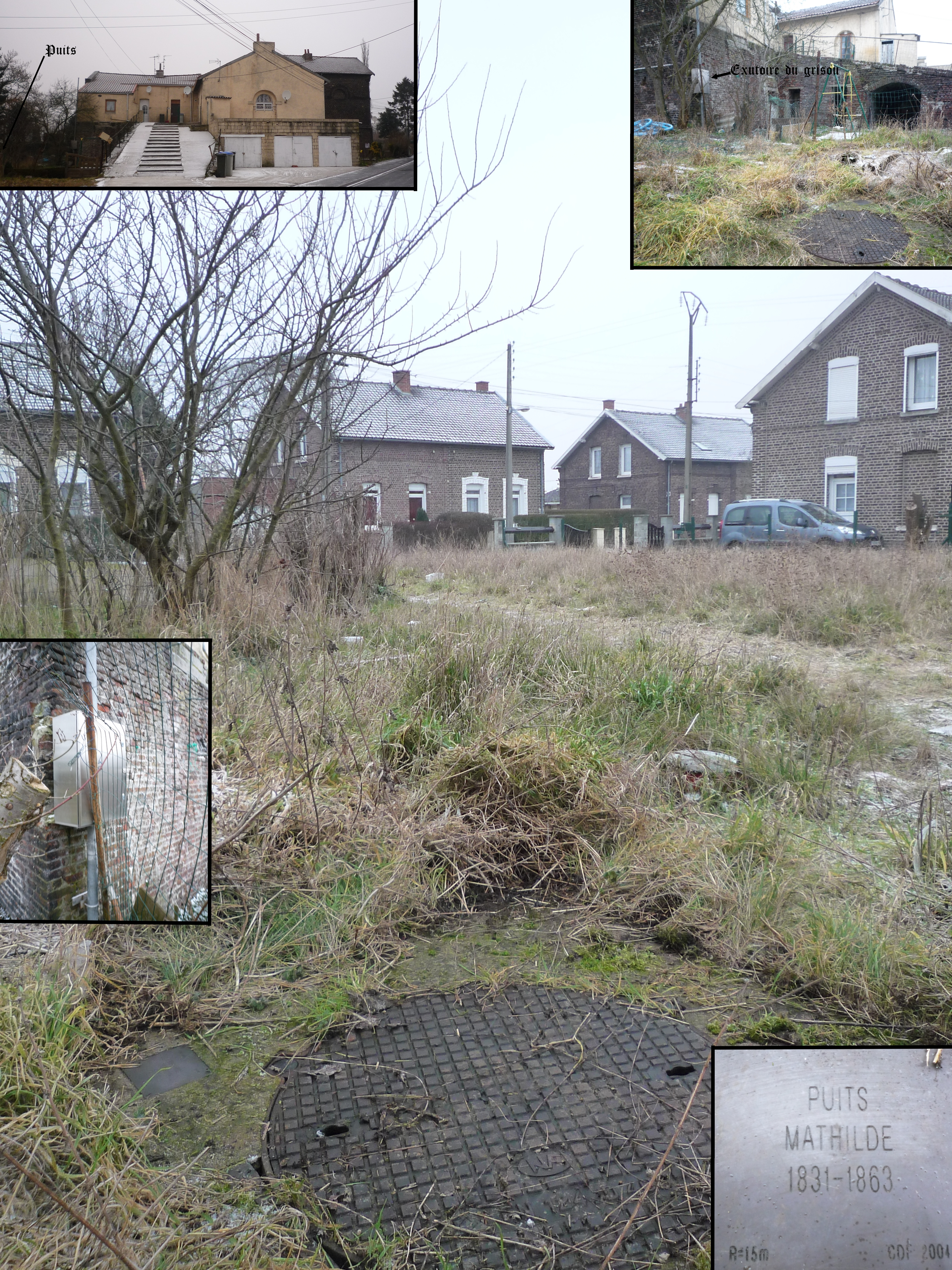 La fosse Mathilde de la Compagnie des mines d'Anzin était un charbonnage du bassin minier du Nord-Pas-de-Calais constitué d'un seul puits situé à Denain, Nord, Nord-Pas-de-Calais, France.